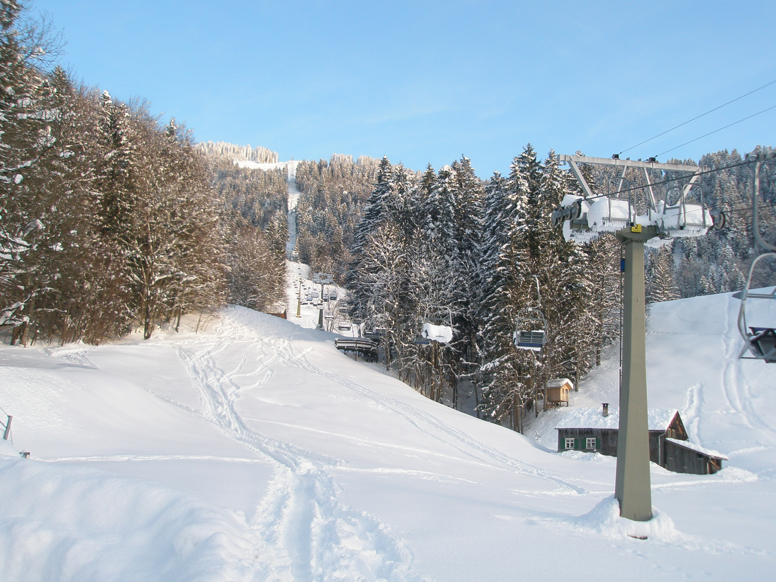 Hirschbergbahn im Winter 2012.